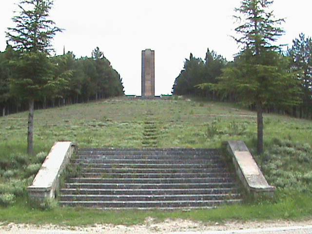 Monumento en Homenaje al General Mola, muerto en accidente de avión durante la Guerra Civil Española, en el Cerro Perejil en la localidad burgalesa de Alcocero.